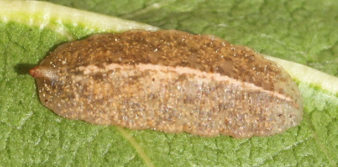 Dipterenlarve Epistrophe cf eligans, am 8. August 2018